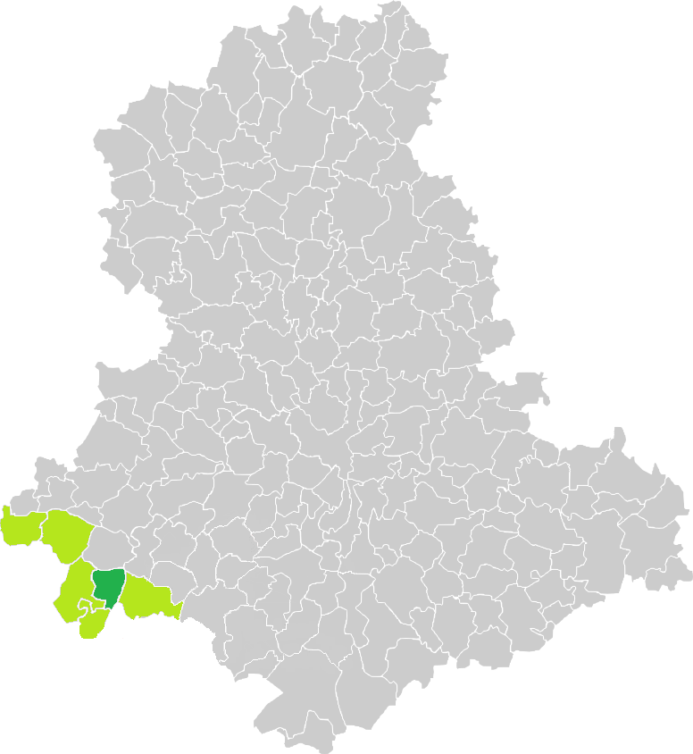 Carte de situation de la commune de La Chapelle-Montbrandeix (en vert foncé) dans le votre Canton (en vert clair) sur une carte des communes de la Haute-Vienne